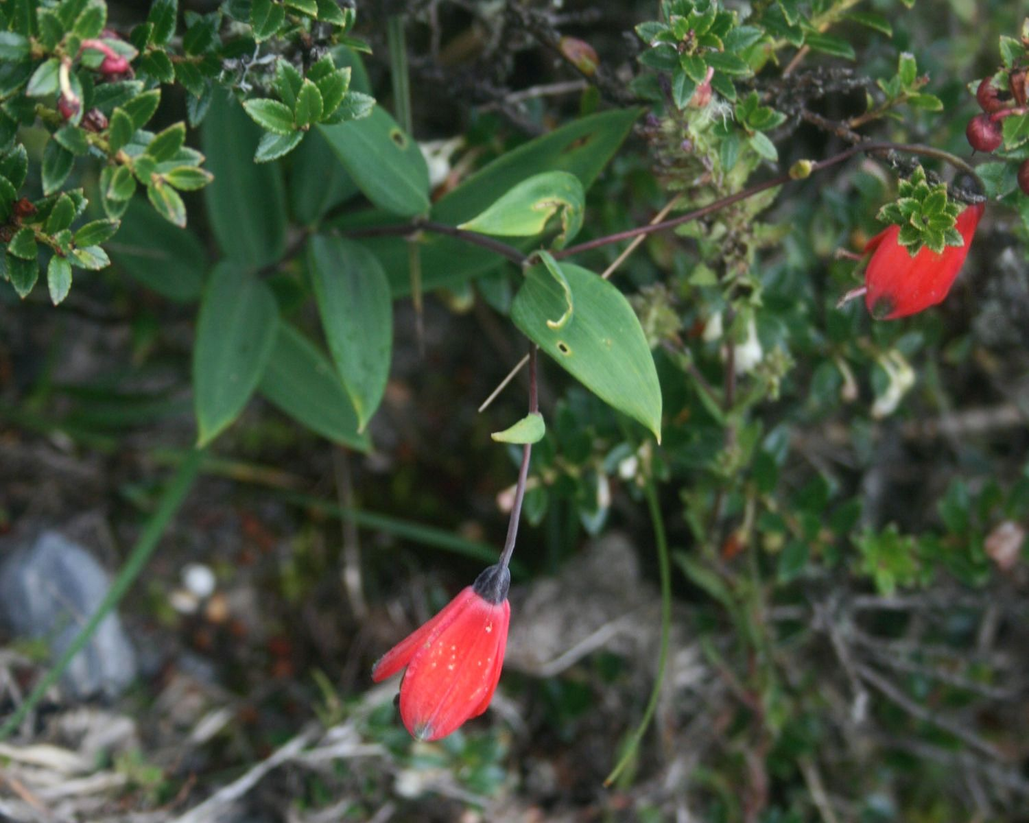 Bomarea pauciflora, Inkaliliengewächse (Alstroemeriaceae) – Kolumbien/Colombia: Dpto. Cundinamarca, Parque Nacional Natural Chingaza, Sendero Lagunas de Siecha, ca. 11–12 km SSE Guasca, ca. 3450 m